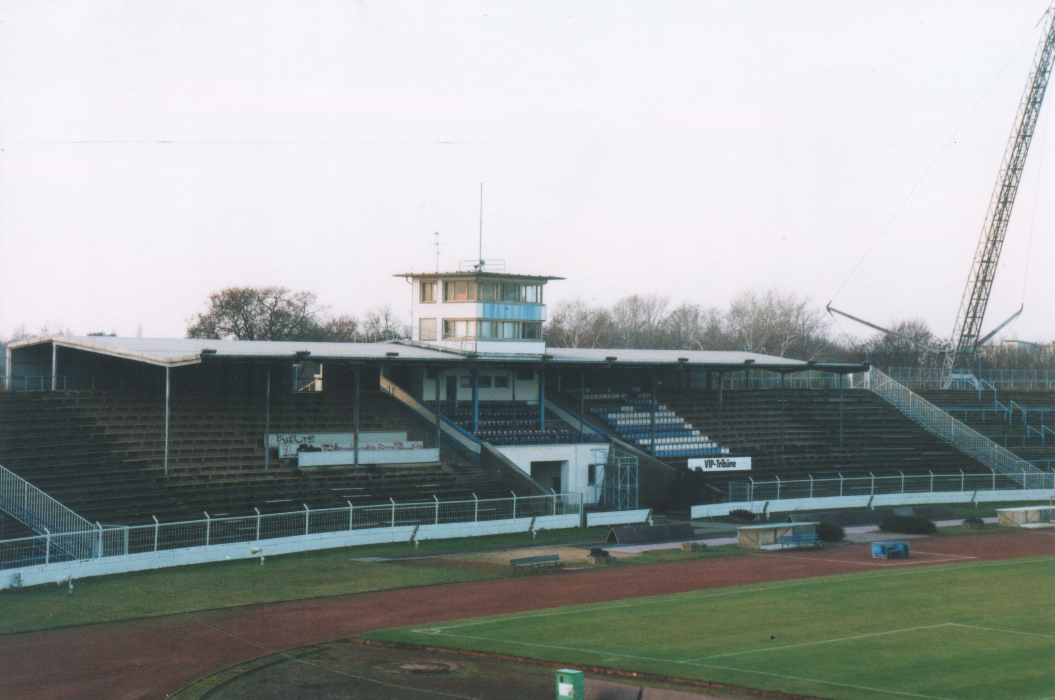 Haupttribüne des ehemaligen Ernst-Grube-Stadions in Magdeburg